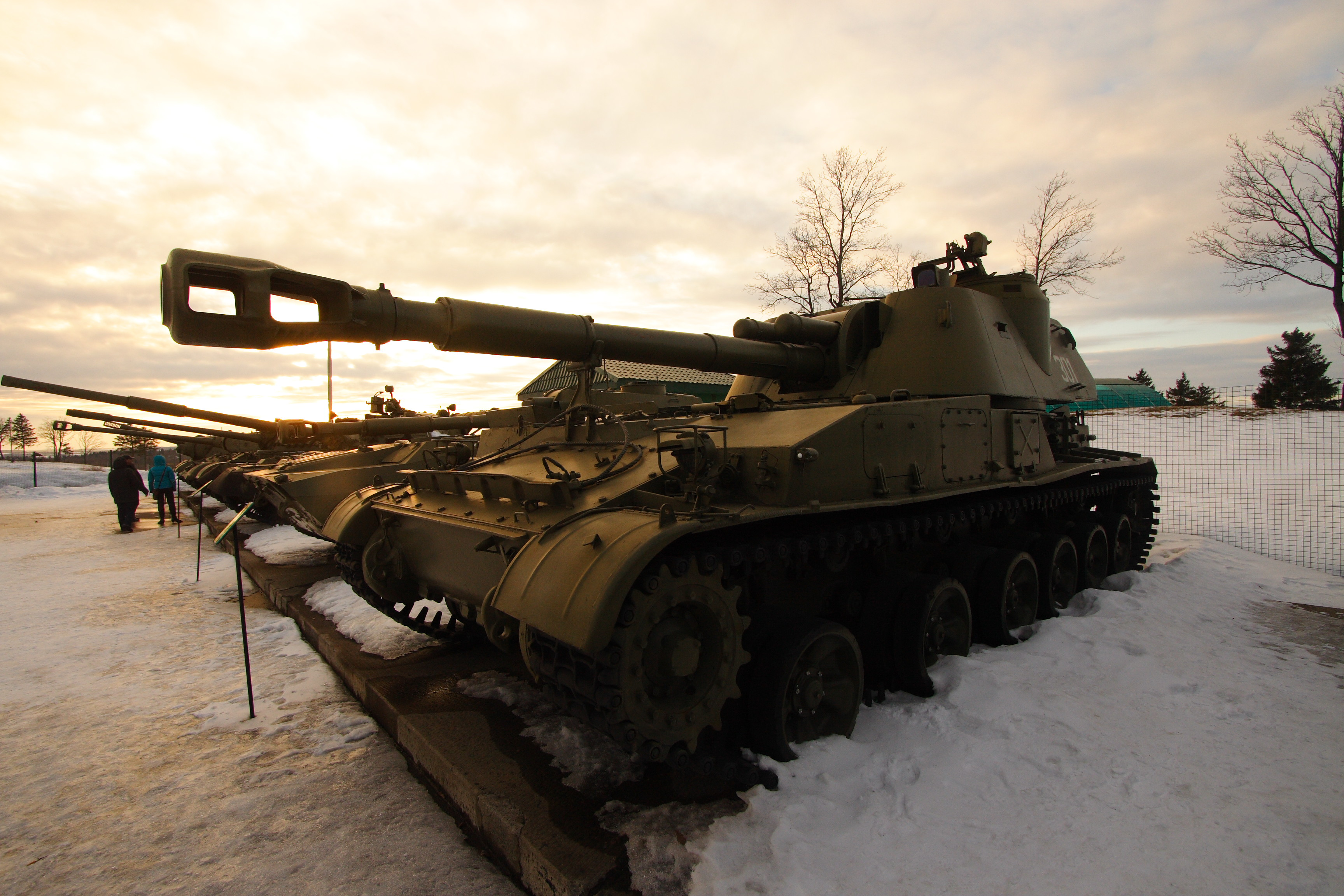 2S3 Akatsiya